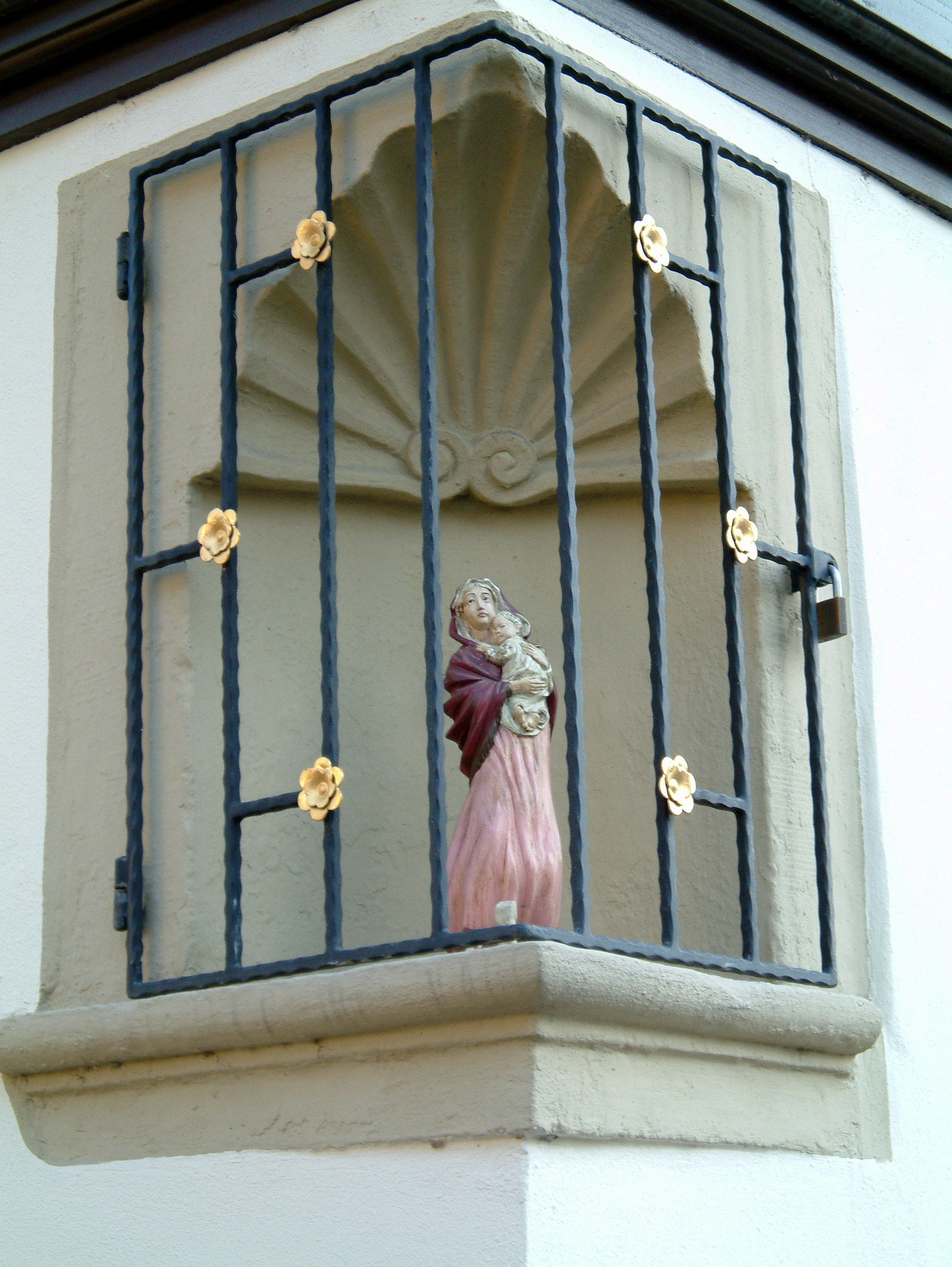 Replik der Madonna, St.-Michael-Apotheke, Marktstr. 2 zu Dirmstein